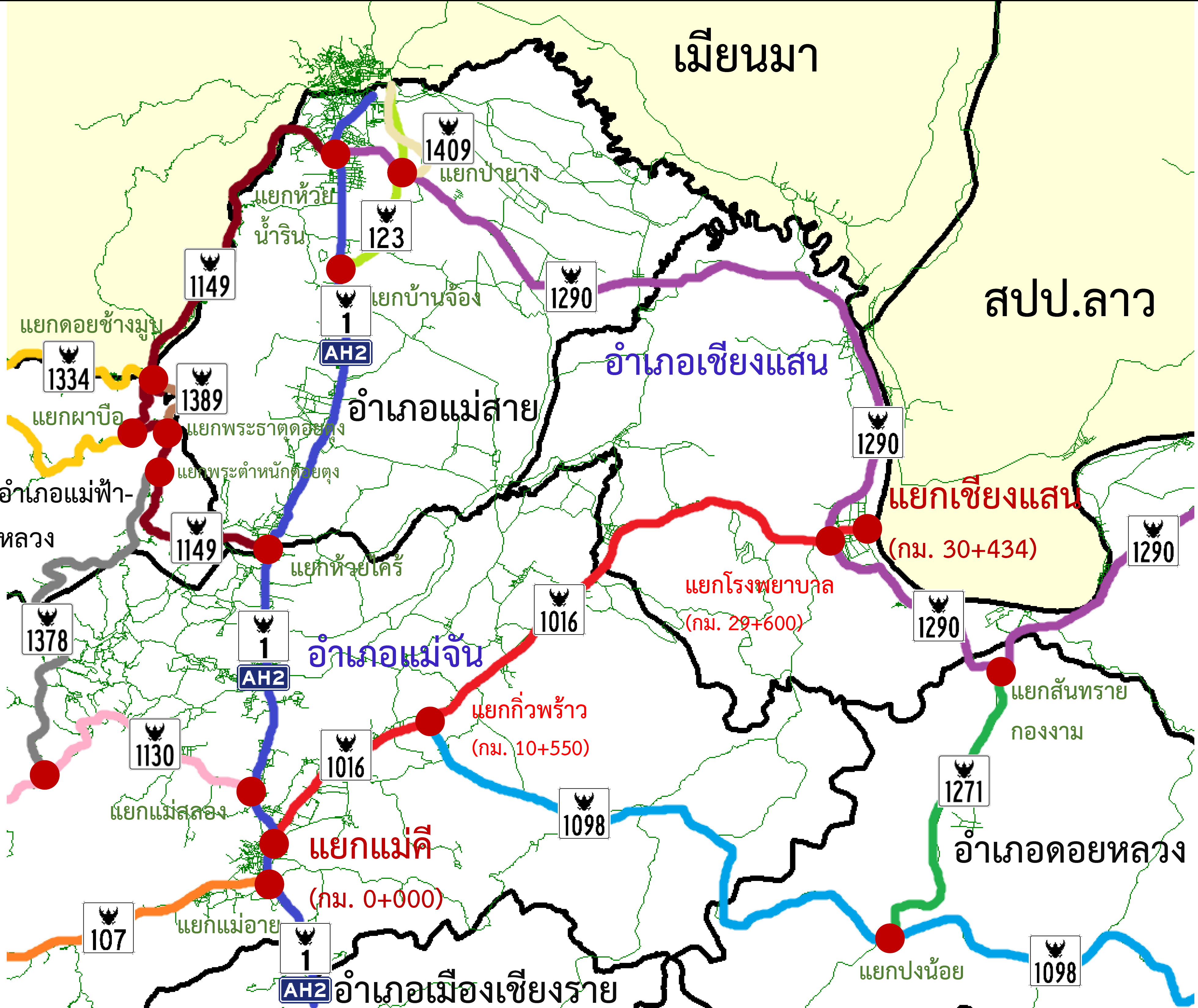 TH HW 1016 map 2